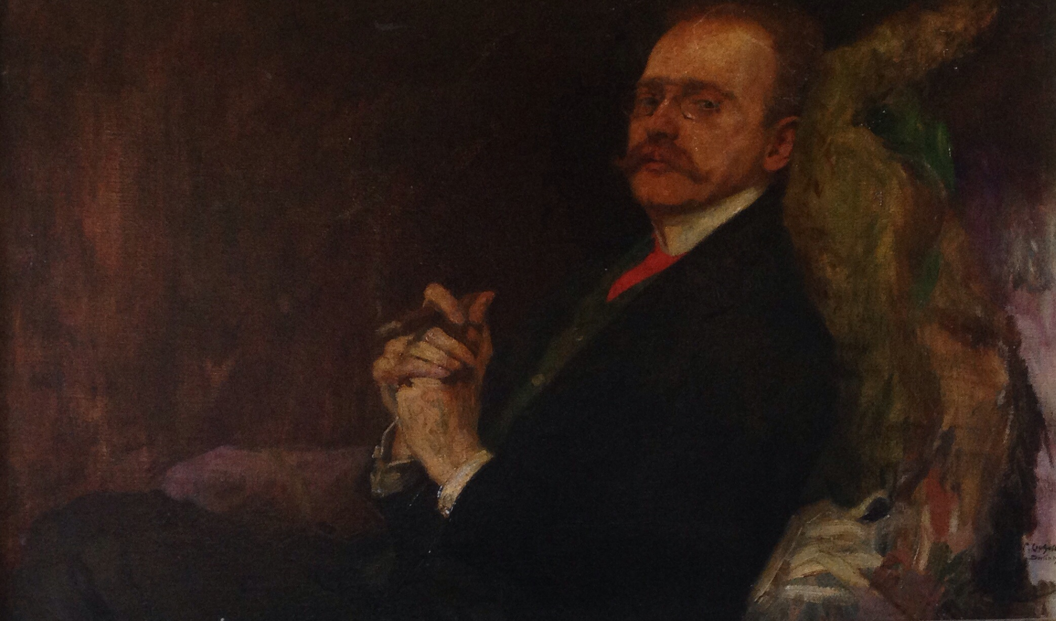 Goldberger war Mitbesitzer des Johann-Strauß-Theaters in Wien. Er schrieb eine Reihe erfolgreicher Operetten, von denen Der Stern von Assuan in der Berliner Kroll-Oper zur Aufführung gelangte und zu einem Konflikt mit der Generalverwaltung der Stadttheater führte. Porträt Öl auf Leinwand, 70 x 110 cm signier unten rechts M.Coschell. Berlin 1903